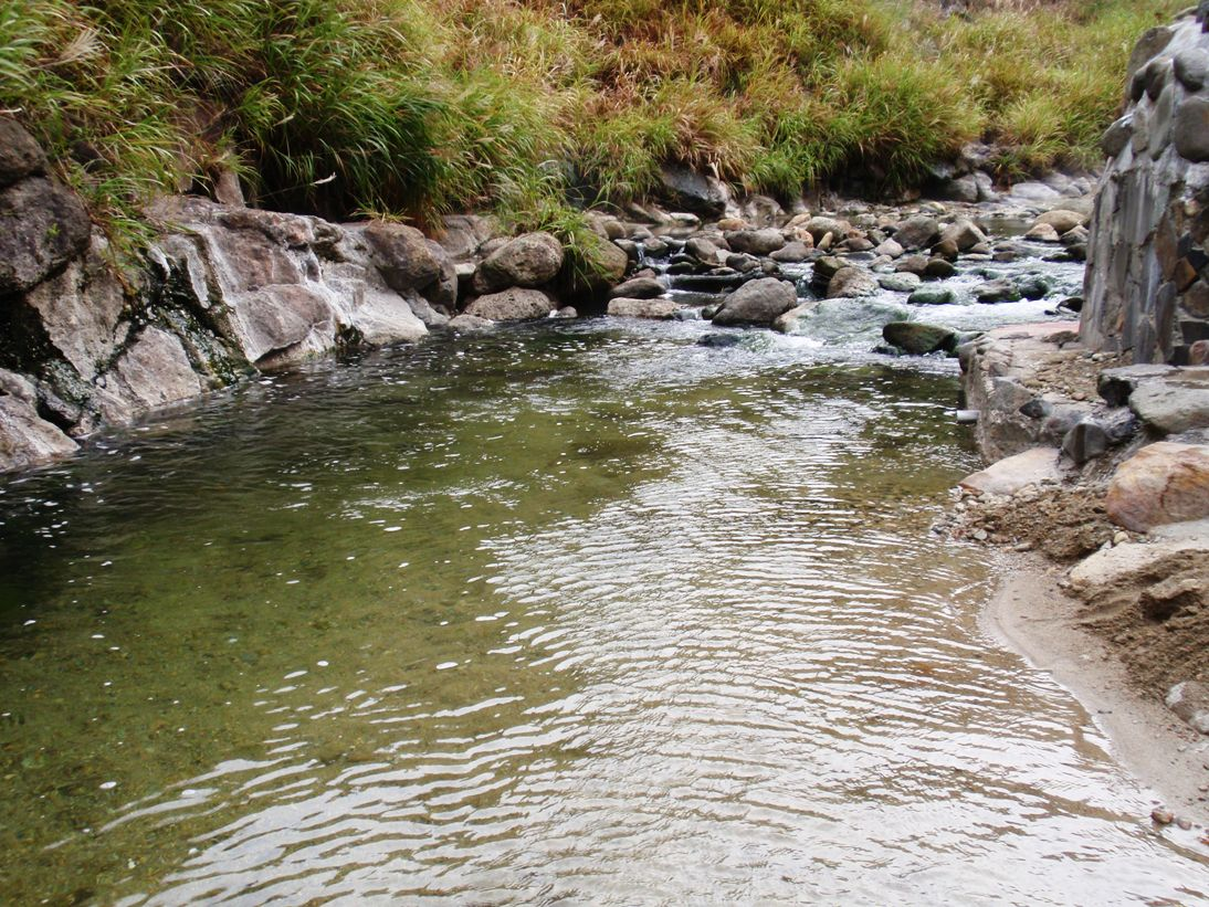 大湯温泉、安部旅館、夏季限定の天然川風呂